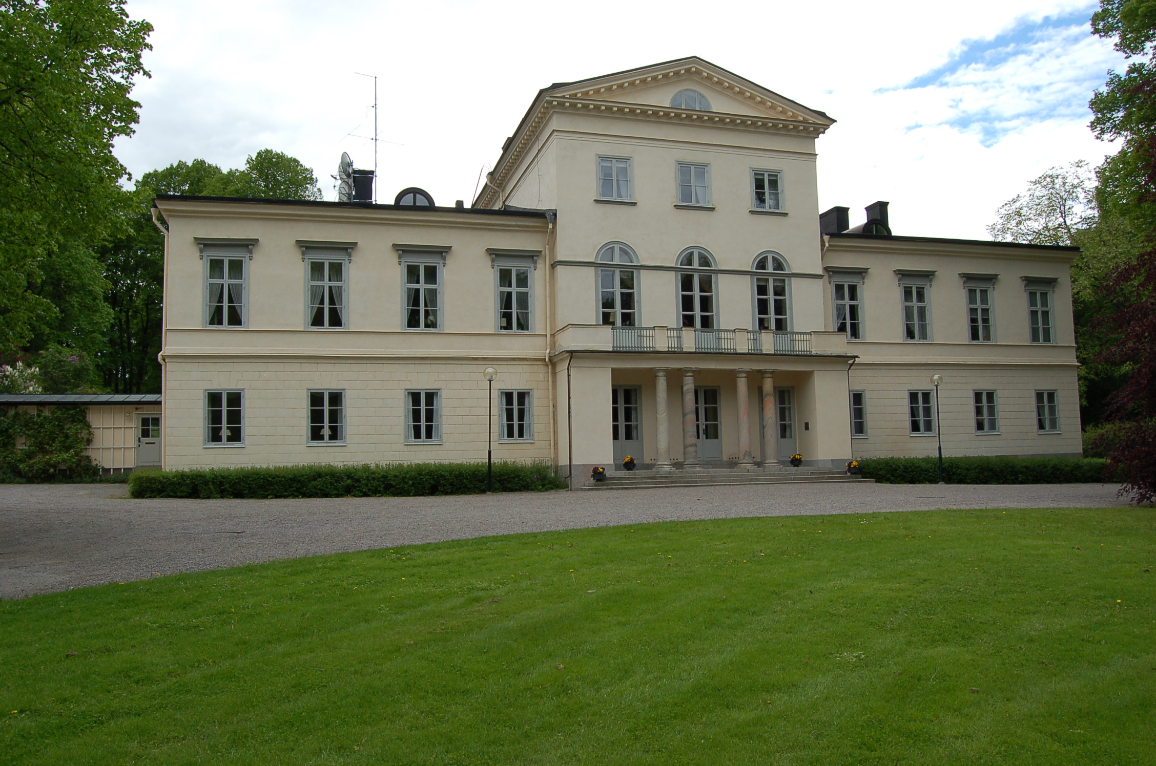 Haga slott i Solna